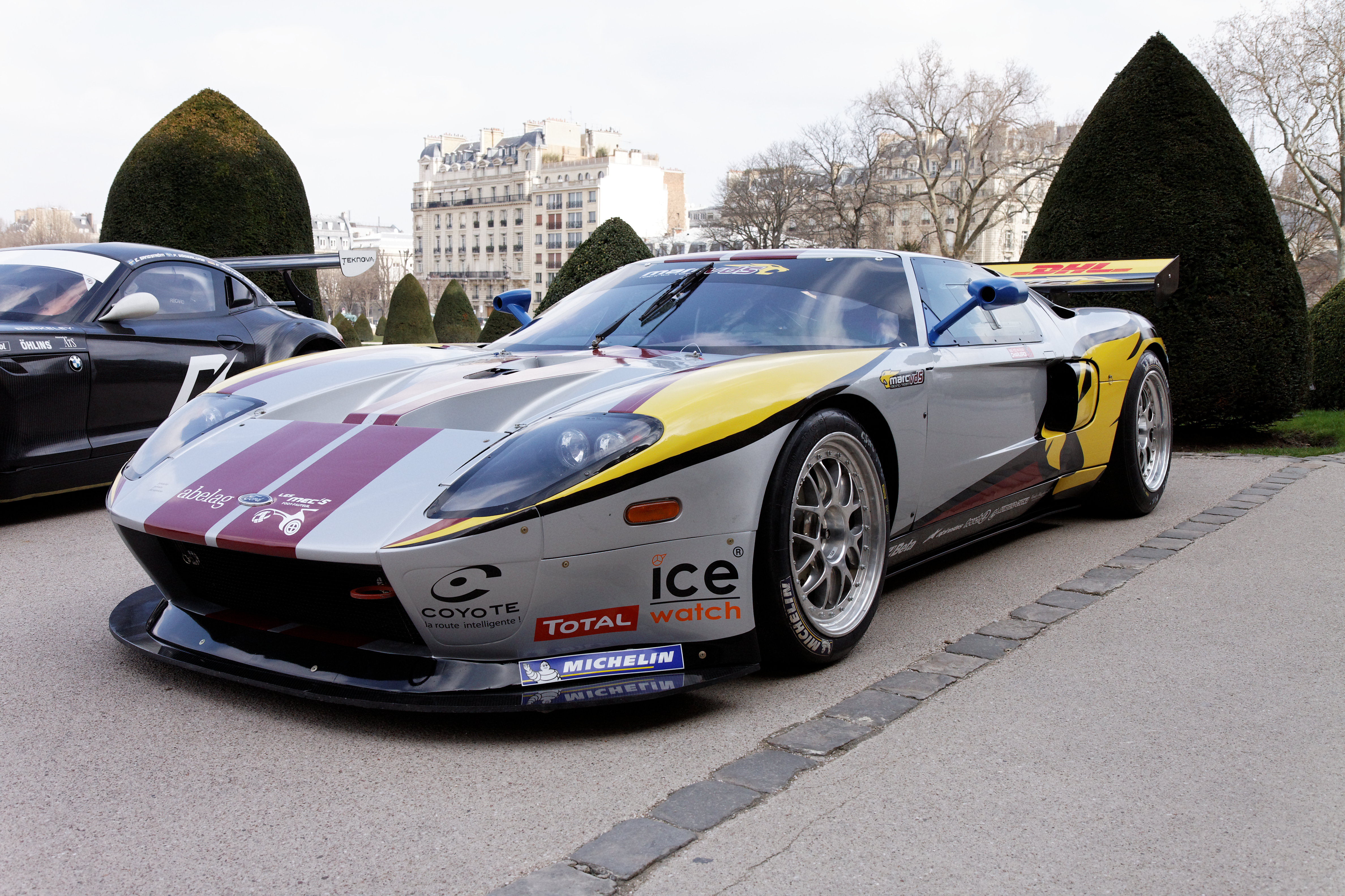 Photographie prise lors de la présentation du Blancpain Endurance series aux Invalides à Paris en mars 2011.